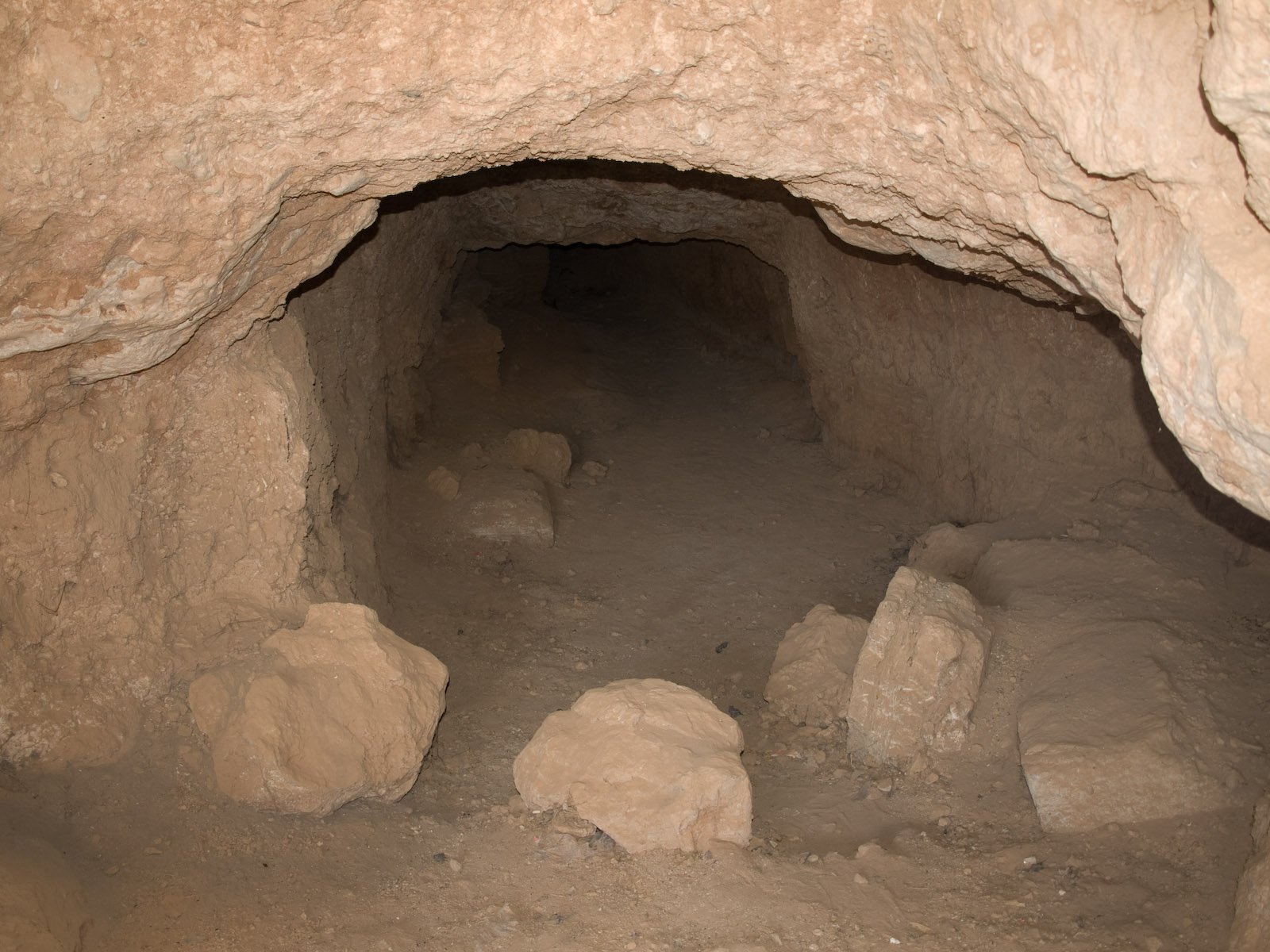 Départ du tunnel de contre-sape sous le rempart de Doura Europos.